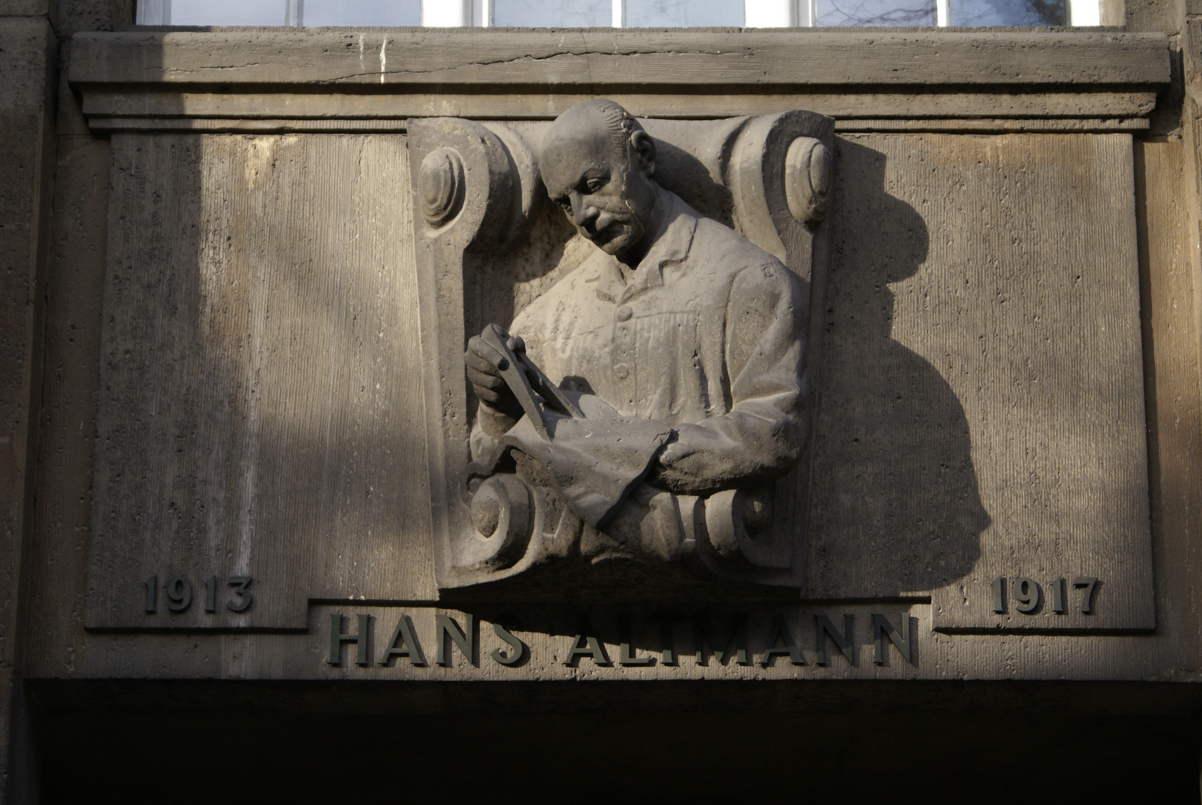 Detail am Rathaus Berlin-Friedenau (Dargestellt ist der Architekt Hans Altmann)